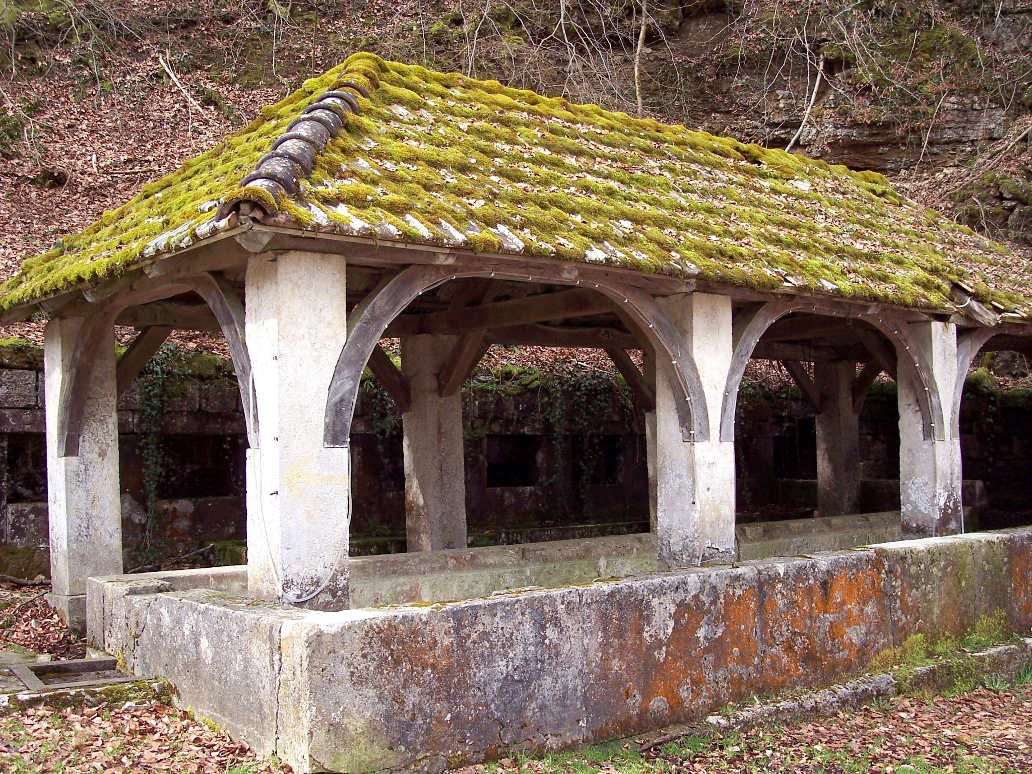 Fontaine-lavoir couverte à Saint-Dizier-l'Evêque. Territoire de Belfort